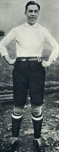 Il calciatore italiano Virginio Rosetta alla Pro Vercelli tra gli anni 10 e 20 del XX secolo.